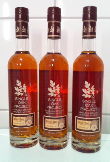 Buffalo Trace Bourbon Whiskey from Select Oak Series